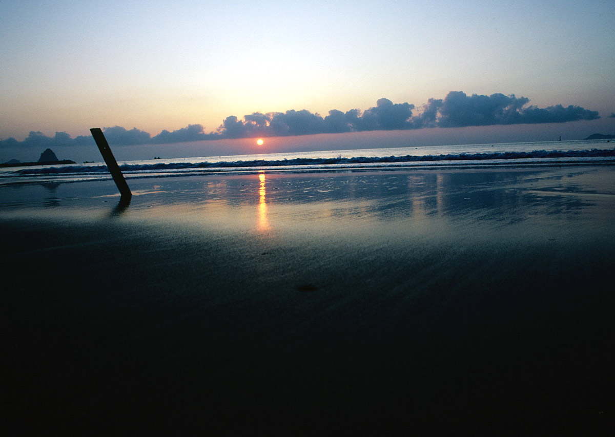 北ノ脇海水浴場